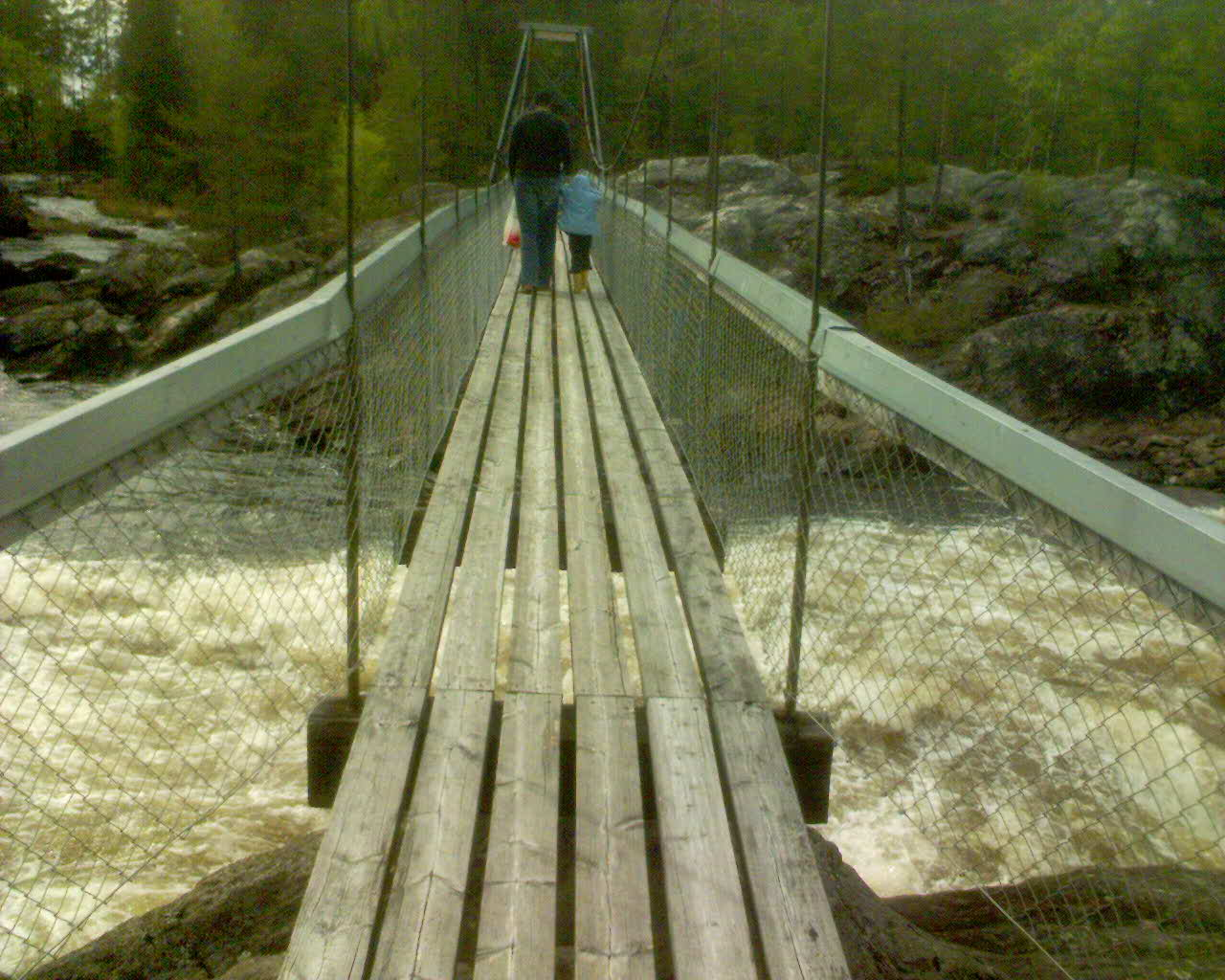 Hängbron över Hylströmmen, Hälsingland